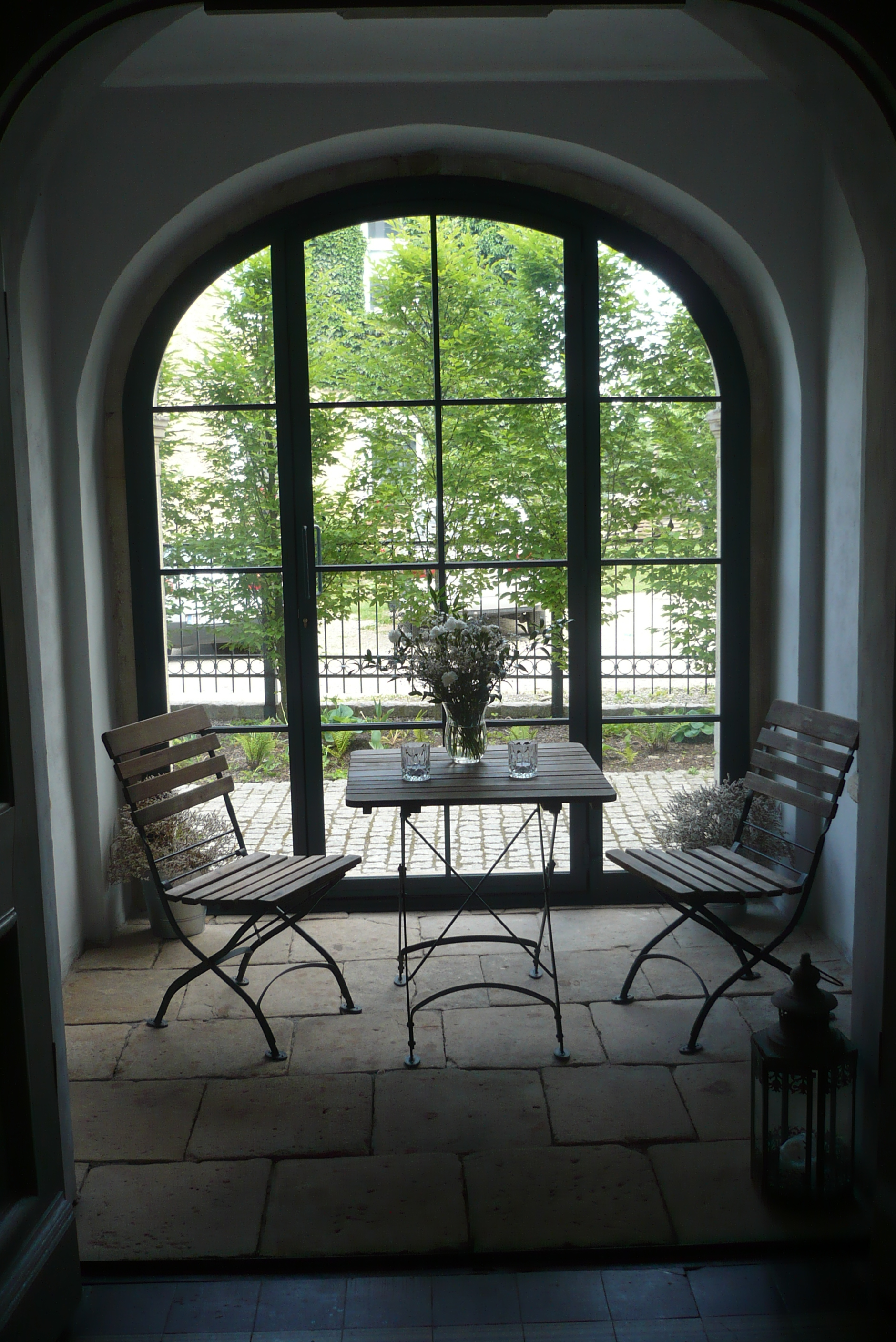 Pałac w Kamieńcu